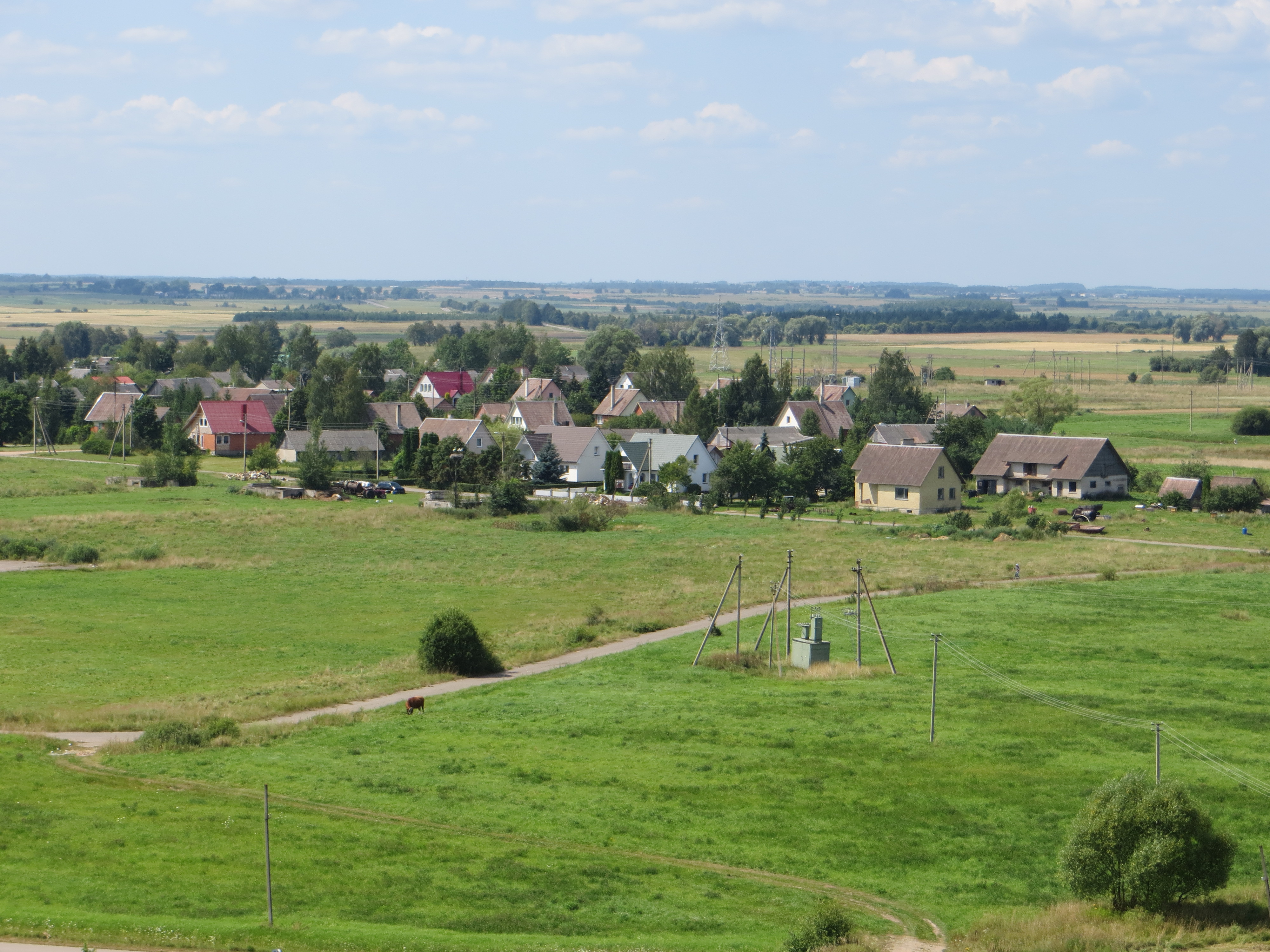 Adutiškio sen., Lithuania